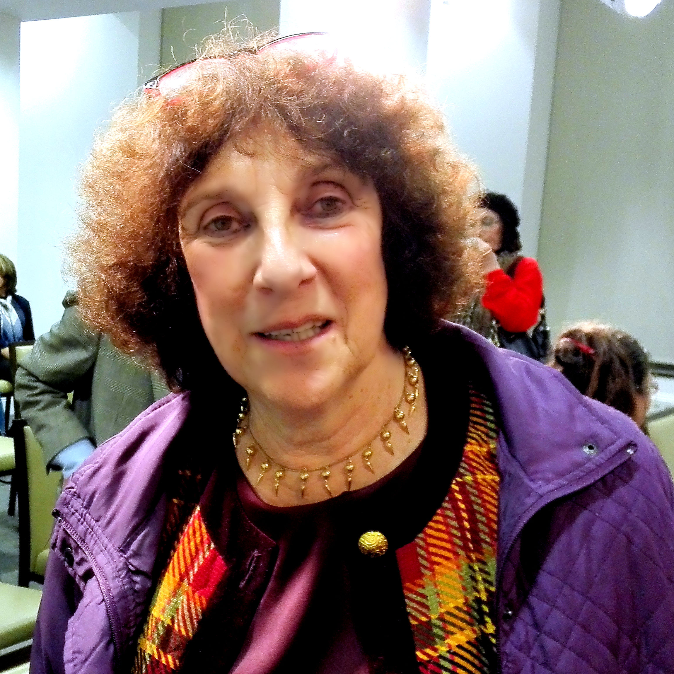 Anne Morelli tijdens een lezing in Brussel over de plaats van de vrouw in drie religies